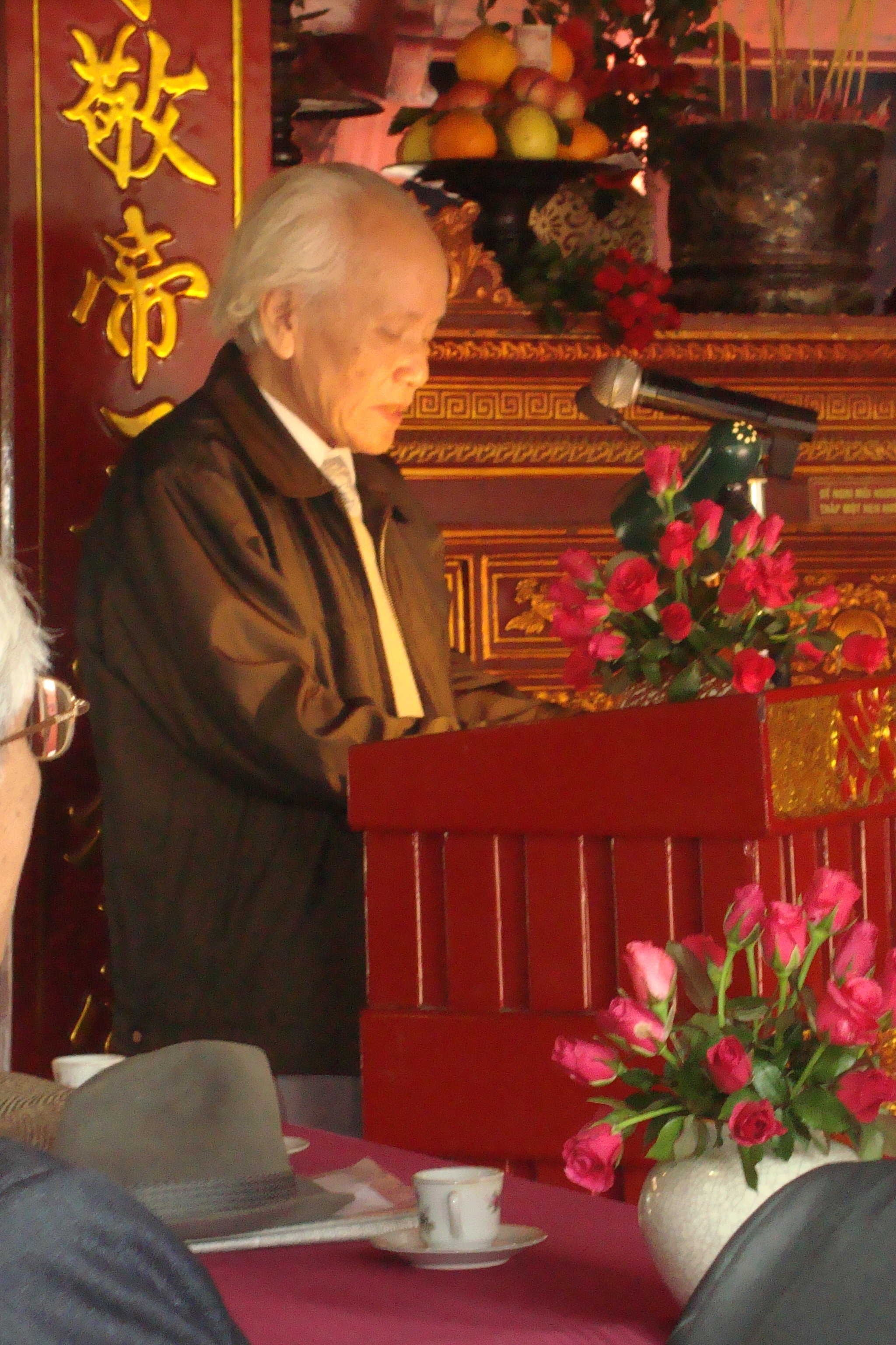 Giáo sư-Nhà giáo Nhân dân Đinh Xuân Lâm phát biểu tại Hội thảo kỷ niệm danh nhân Doãn Khuê.